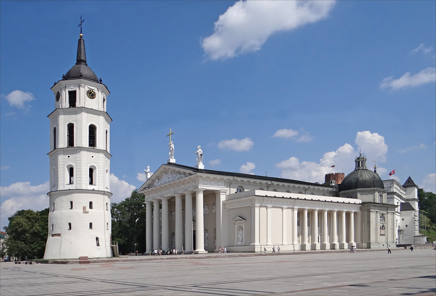 Située sur un très ancien lieu de culte païen, la cathédrale catholique a été reconstruite plusieurs fois en raison des destructions causées par les guerres. Les premières églises ont été élevées par Mindaugas en 1251. A gauche le beffroi qui date de 1522. Article de Wikipedia sur la cathédrale Site sur Vilnius